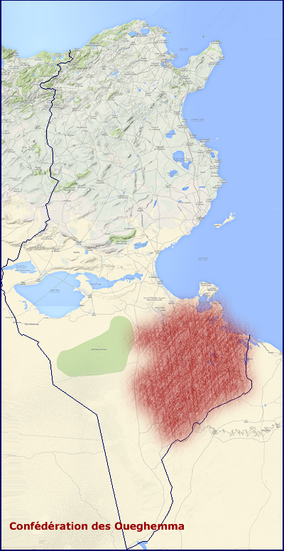 Localisation Confédération des Ouerghemma